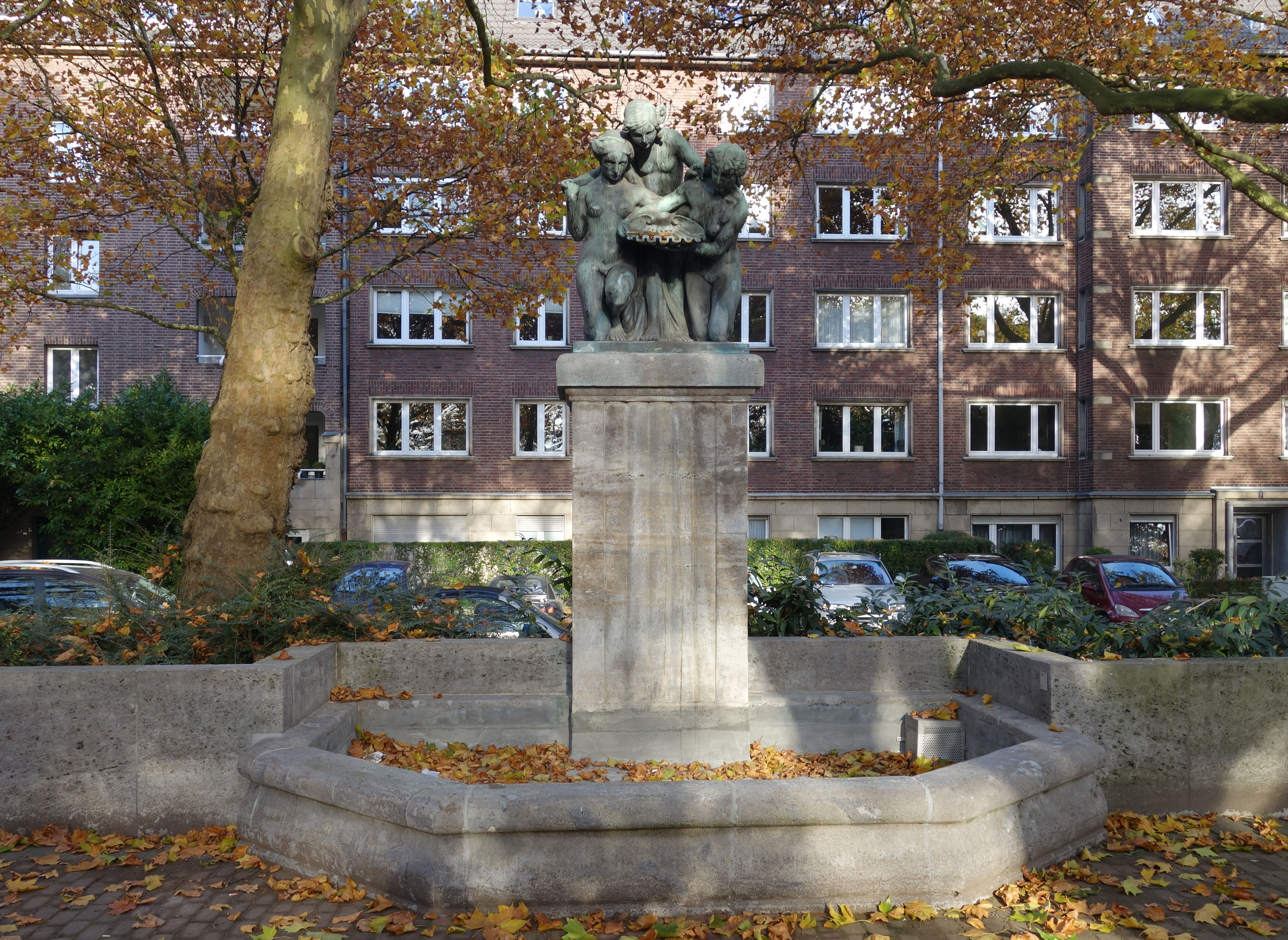 Dreimädel-Brunnen von Leon Lauffs, Reeser Platz, Düsseldorf, 2019.